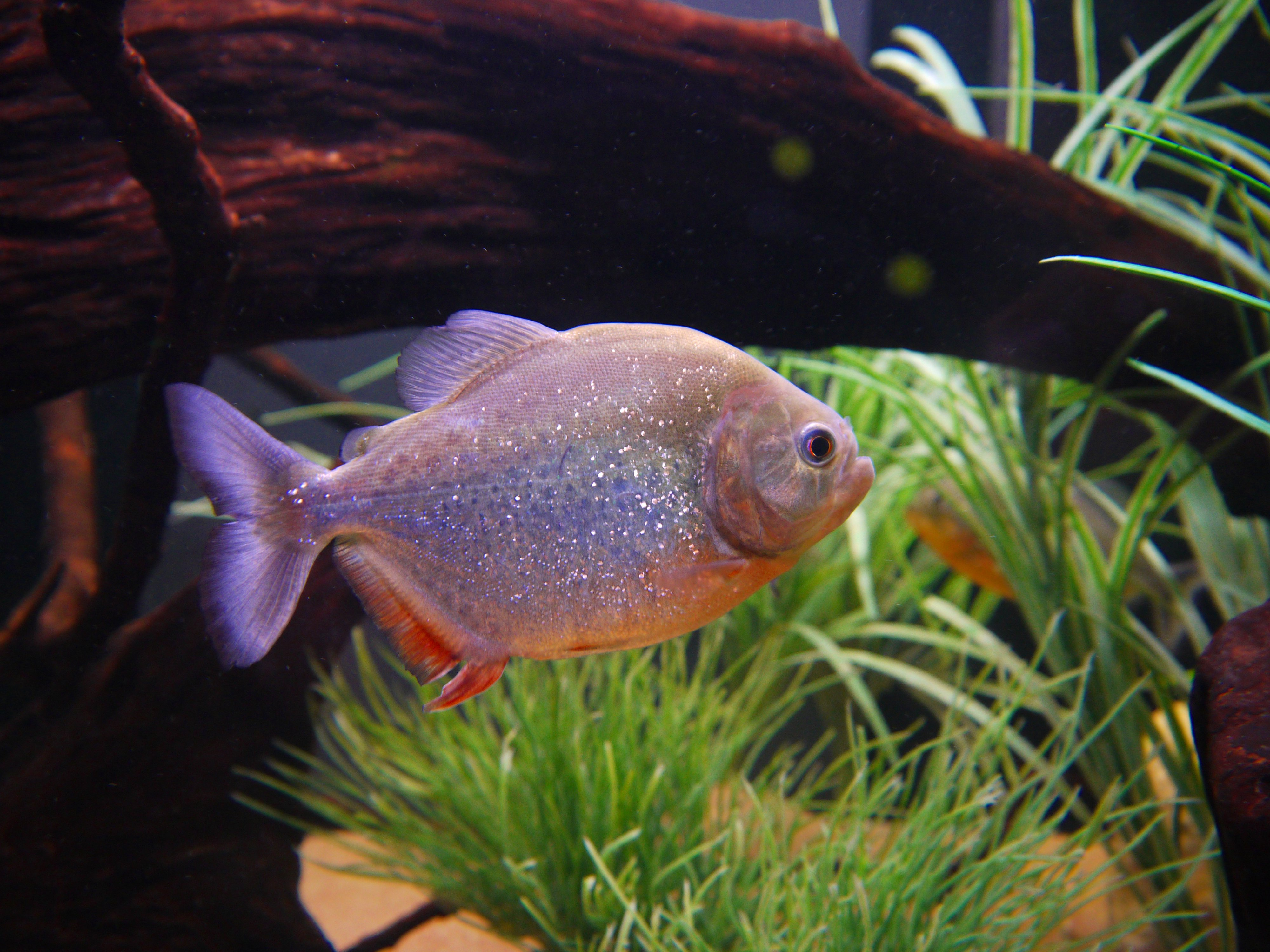 Piranha vermelha en el Acuario de São Paulo, Brasil